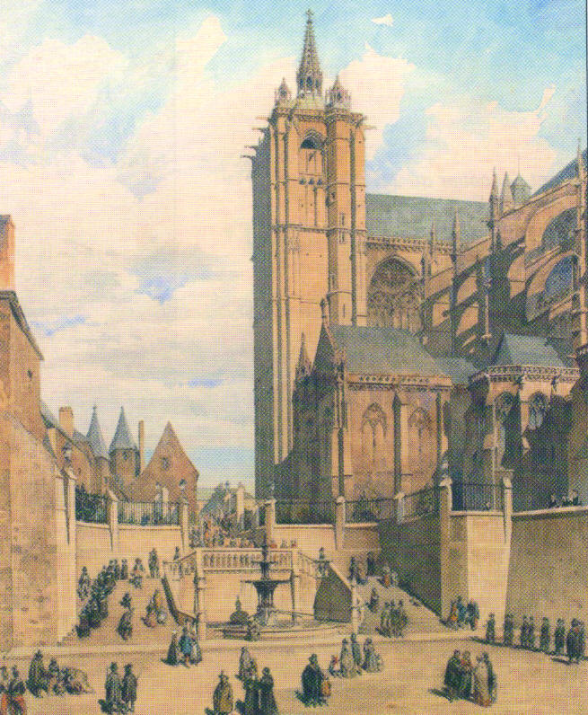 La cathédrale du Mans sur une peinture du XIXème siècle